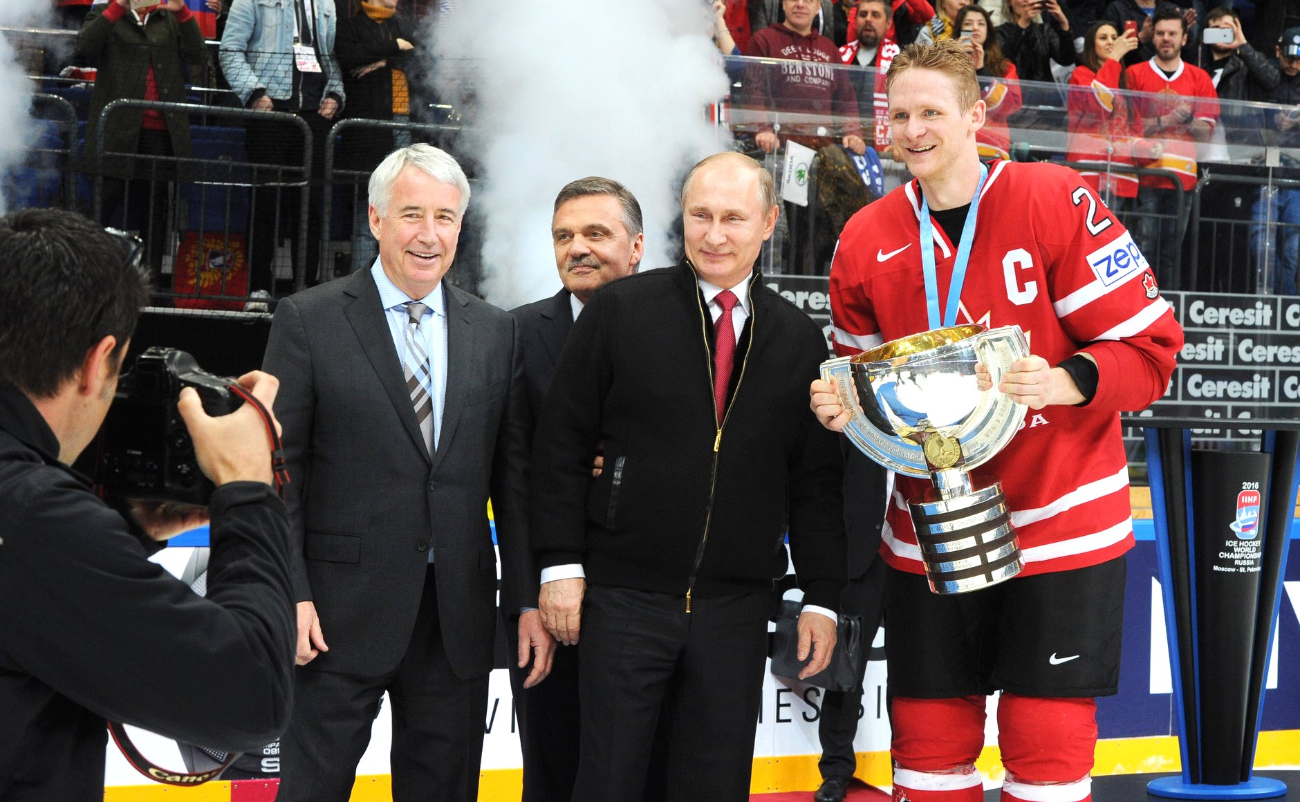 Президент России Владимир Путин с вице-президентом Международной федерации хоккея на льду (МФХЛ) Бобом Николсоном (слева), президентом МФХЛ Рене Фазелем и игроком сборной команды Канады Кори Перри на церемонии награждения победителей чемпионата мира по хоккею